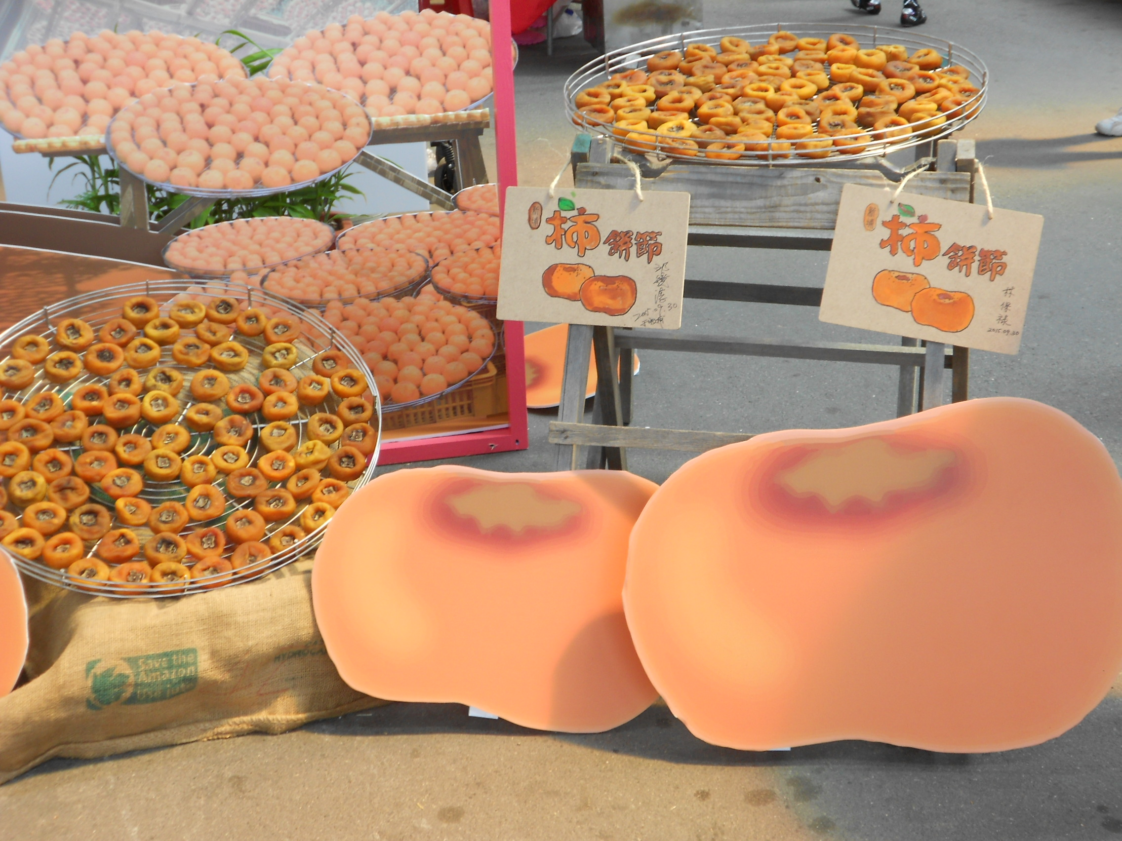 2015年台灣新竹縣新埔鎮文化活動新埔柿餅節的會場展示